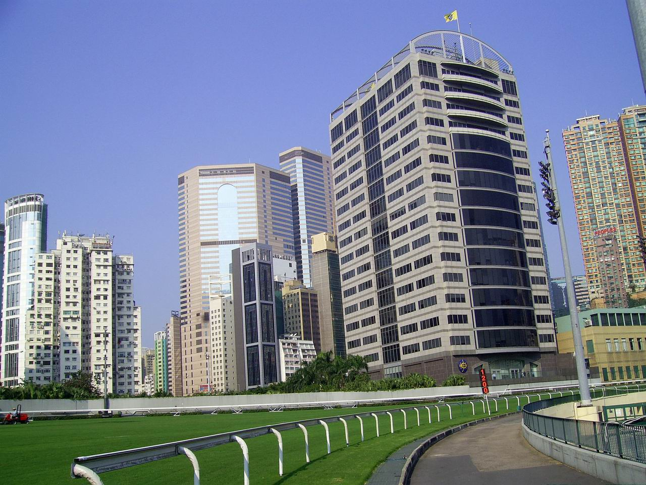 中文（香港）: 跑馬地馬會大廈